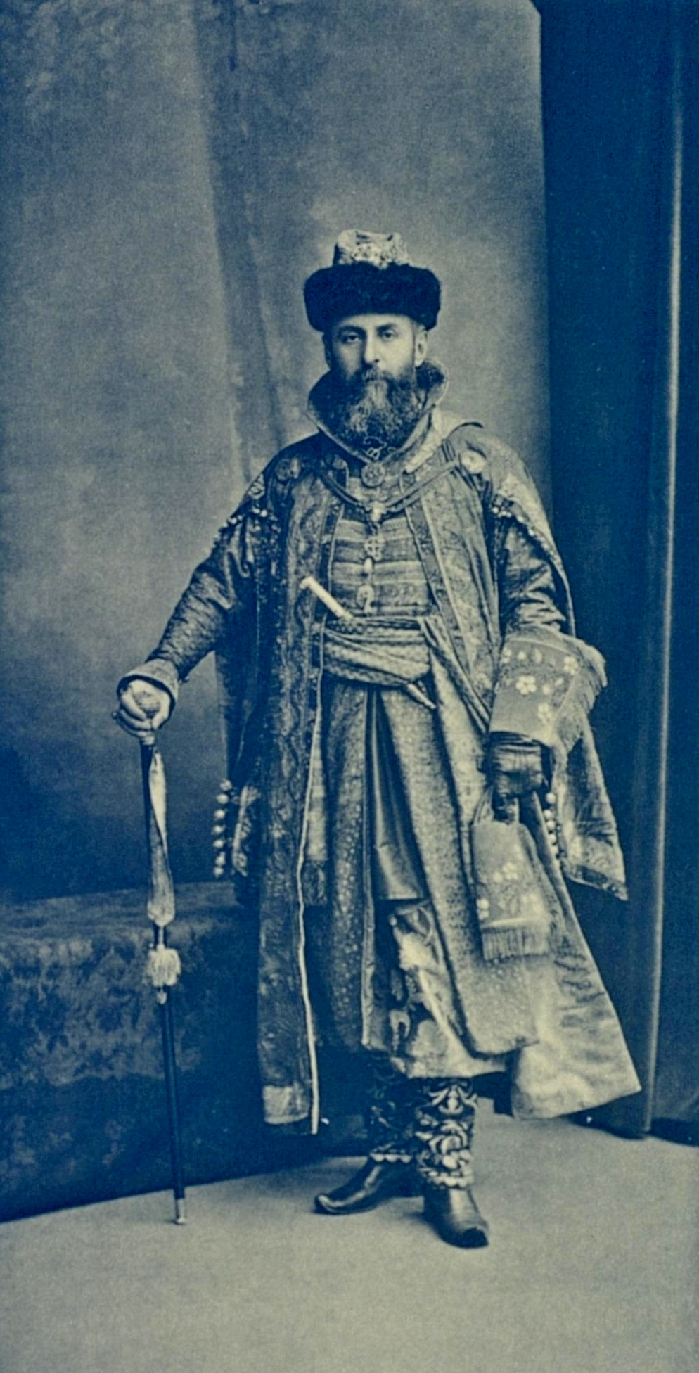 Гофмейстер граф Алексей Александрович Бобринский (Боярин XVII века)